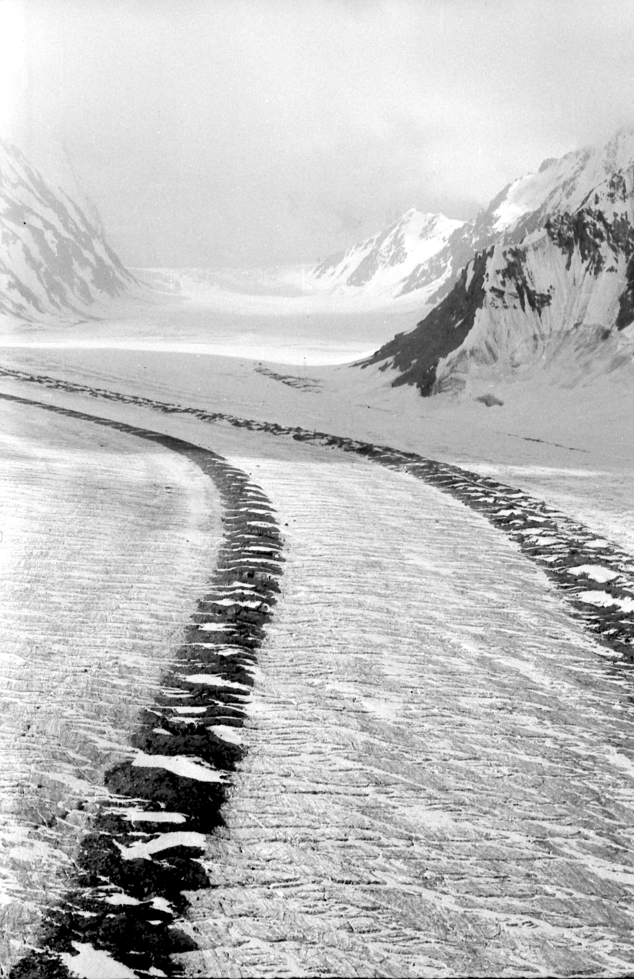 Ekspeditsioon mäetipule "Tartu Ülikool 350". Fedtšenko liustik.